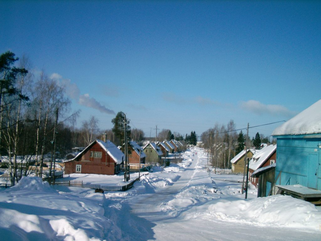 Suojärvi